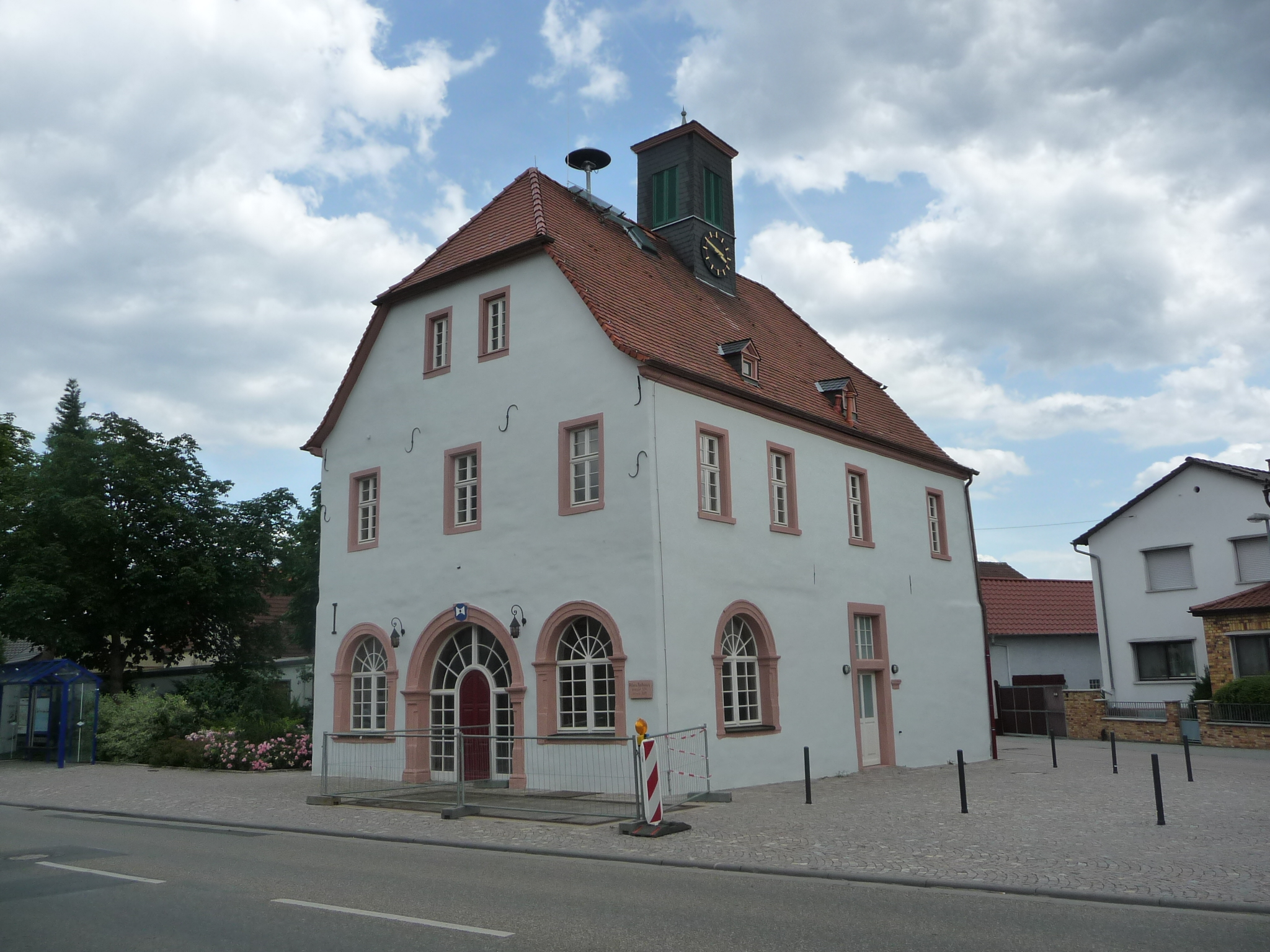 Hofheim